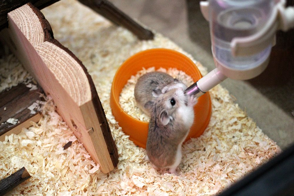 Roborovski siskokset